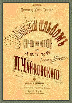 Детский альбом — прижизненное издание Скан титульного листа